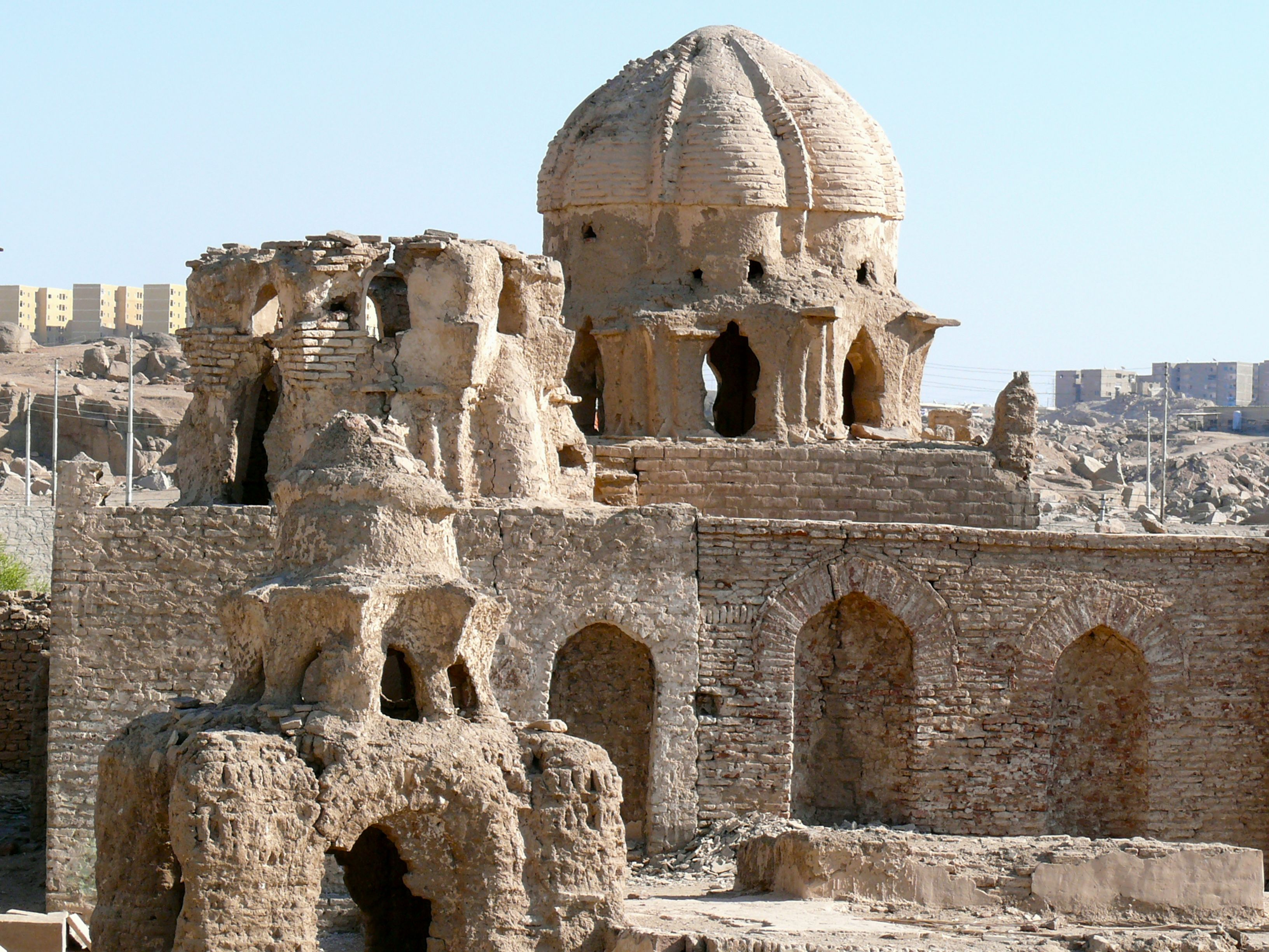 Grabanlage mit Kuppel aus der Zeit der Fatimiden, Assuan